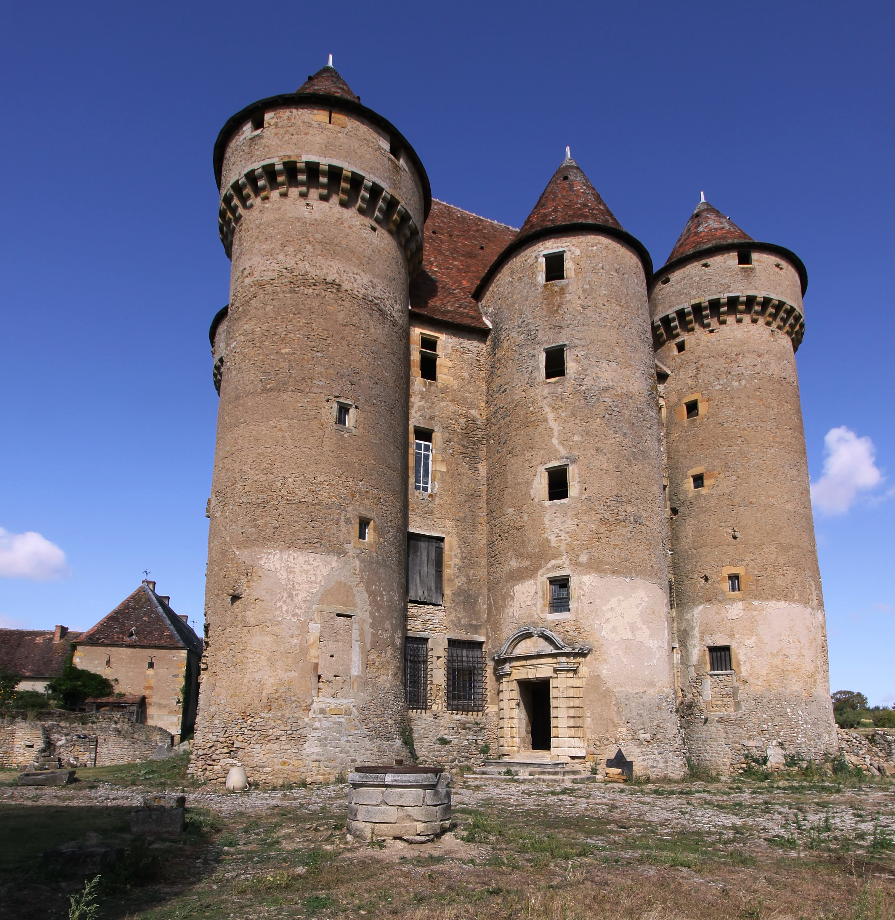 Schloss Sarzay im französischen Département Indre - Südseite mit später angebautem Treppenturm, der keine Pechnasen besitzt.